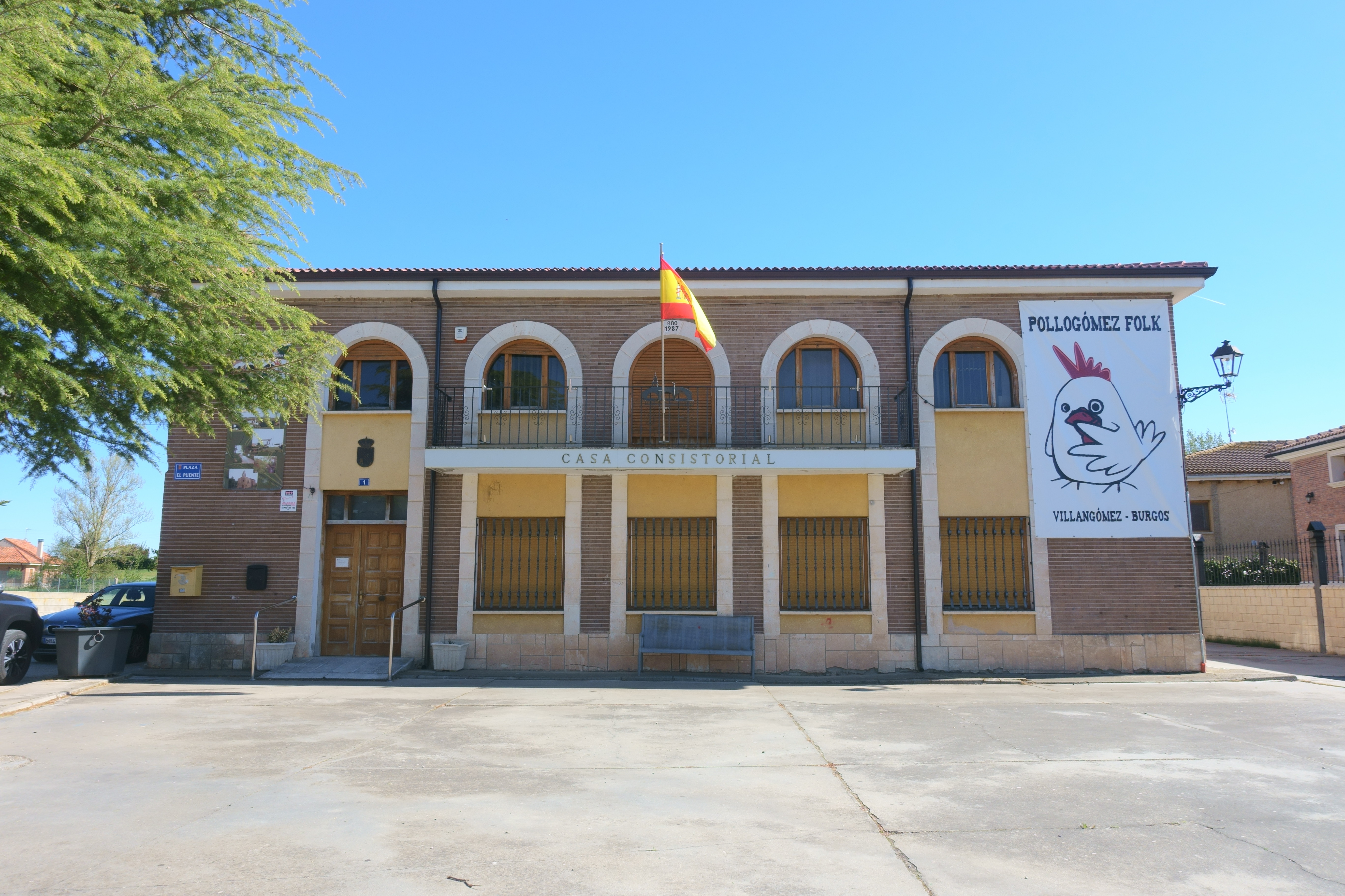 Casa consistorial de Villangómez (Burgos, España).